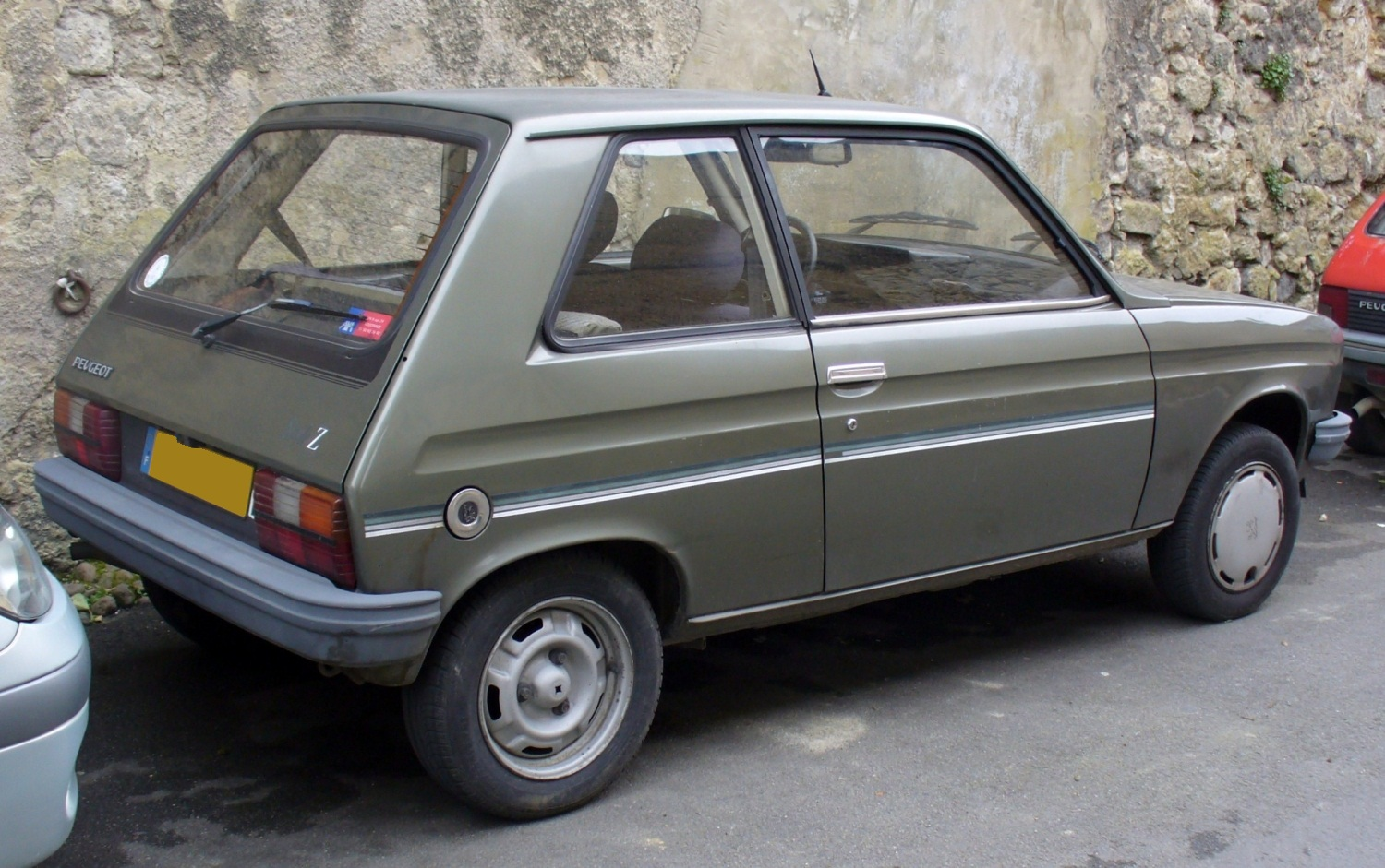 Peugeot 104